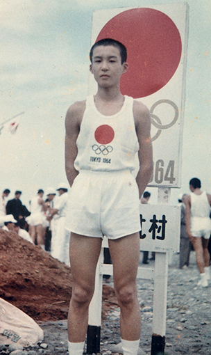 Motoi Oyama, 1964 Olympics